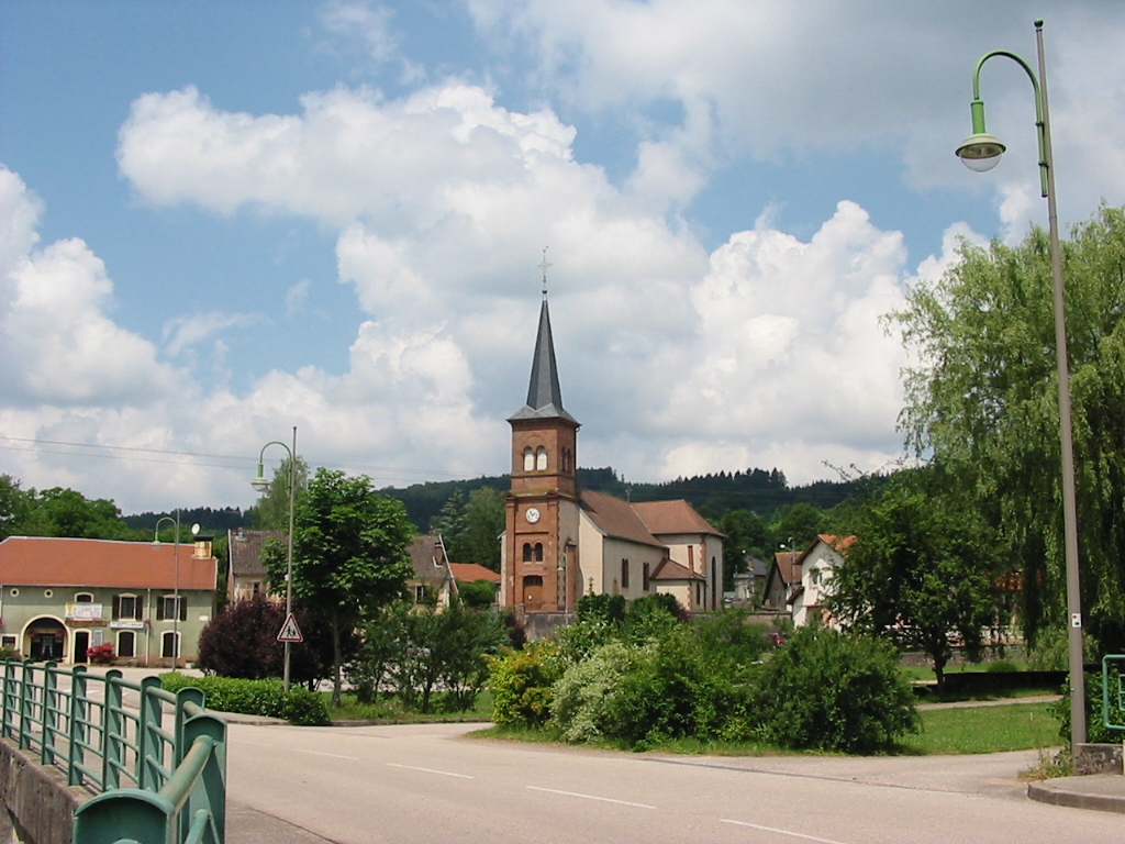 Hurbache Commune du canton de Senones (Vosges) Photo personnelle du 29 juin 2006. Copyright © Christian Amet